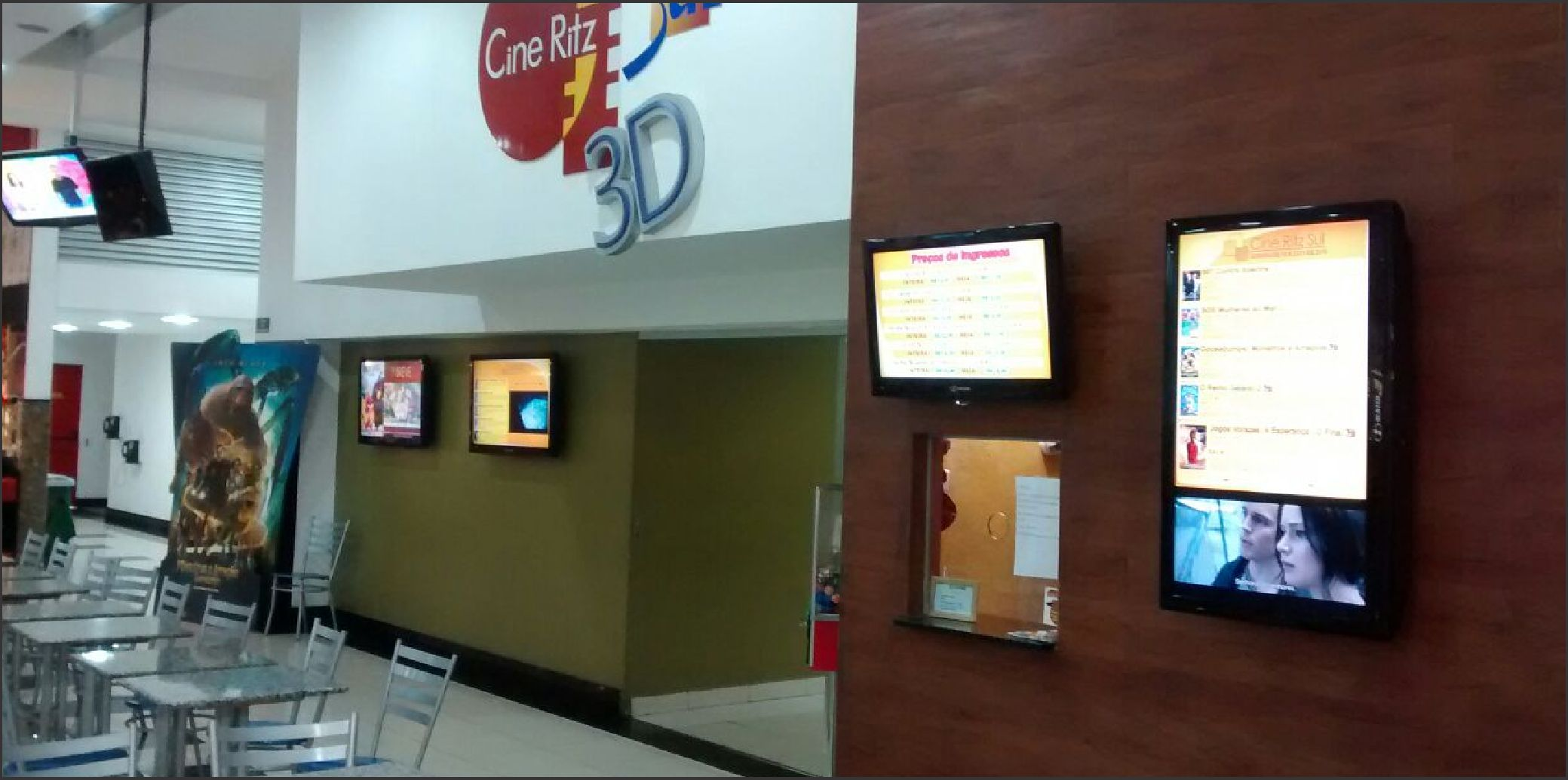 Área externa do Cine Ritz Shopping Sul de Cachoeiro do Itapemirim